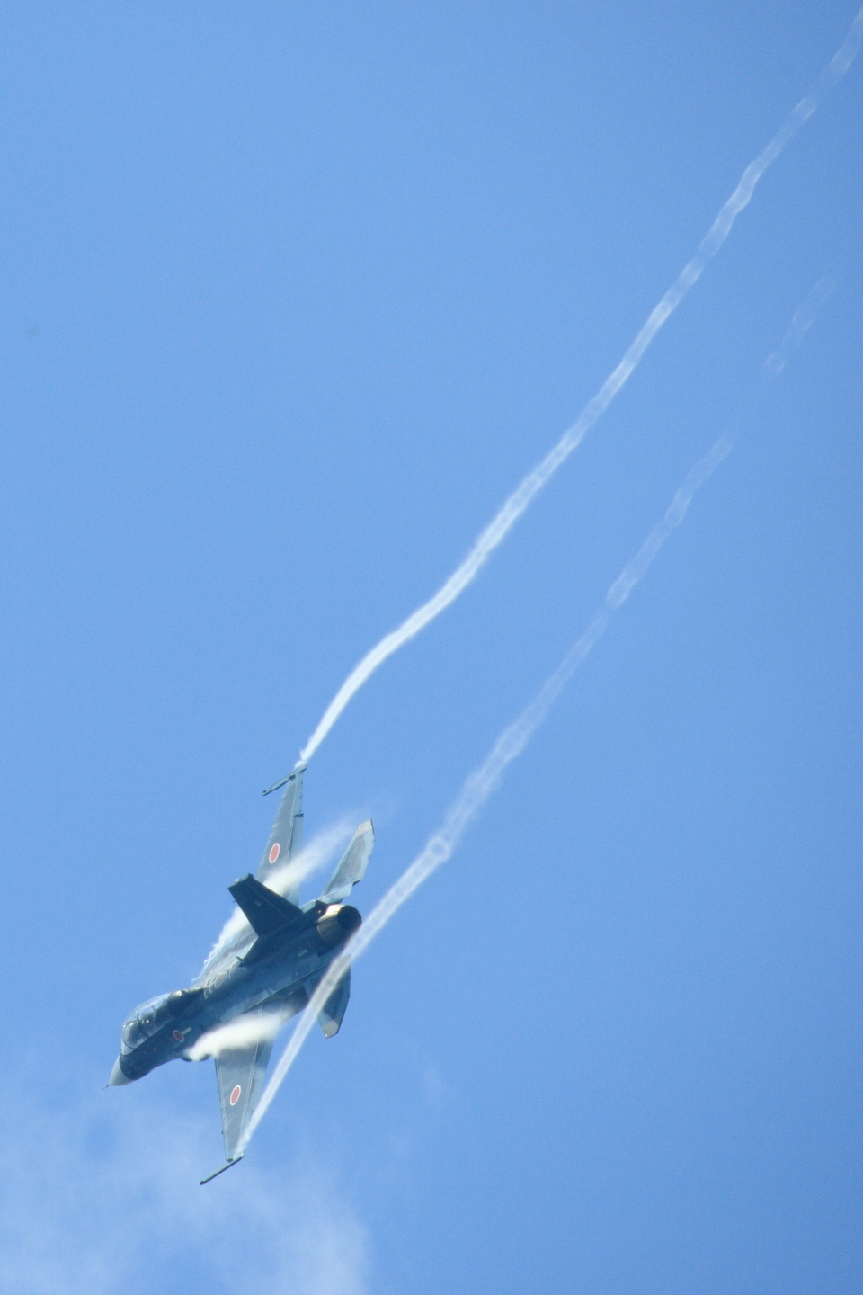 航空自衛隊松島基地 第21飛行隊の、第21飛行隊F-2B支援戦闘機。